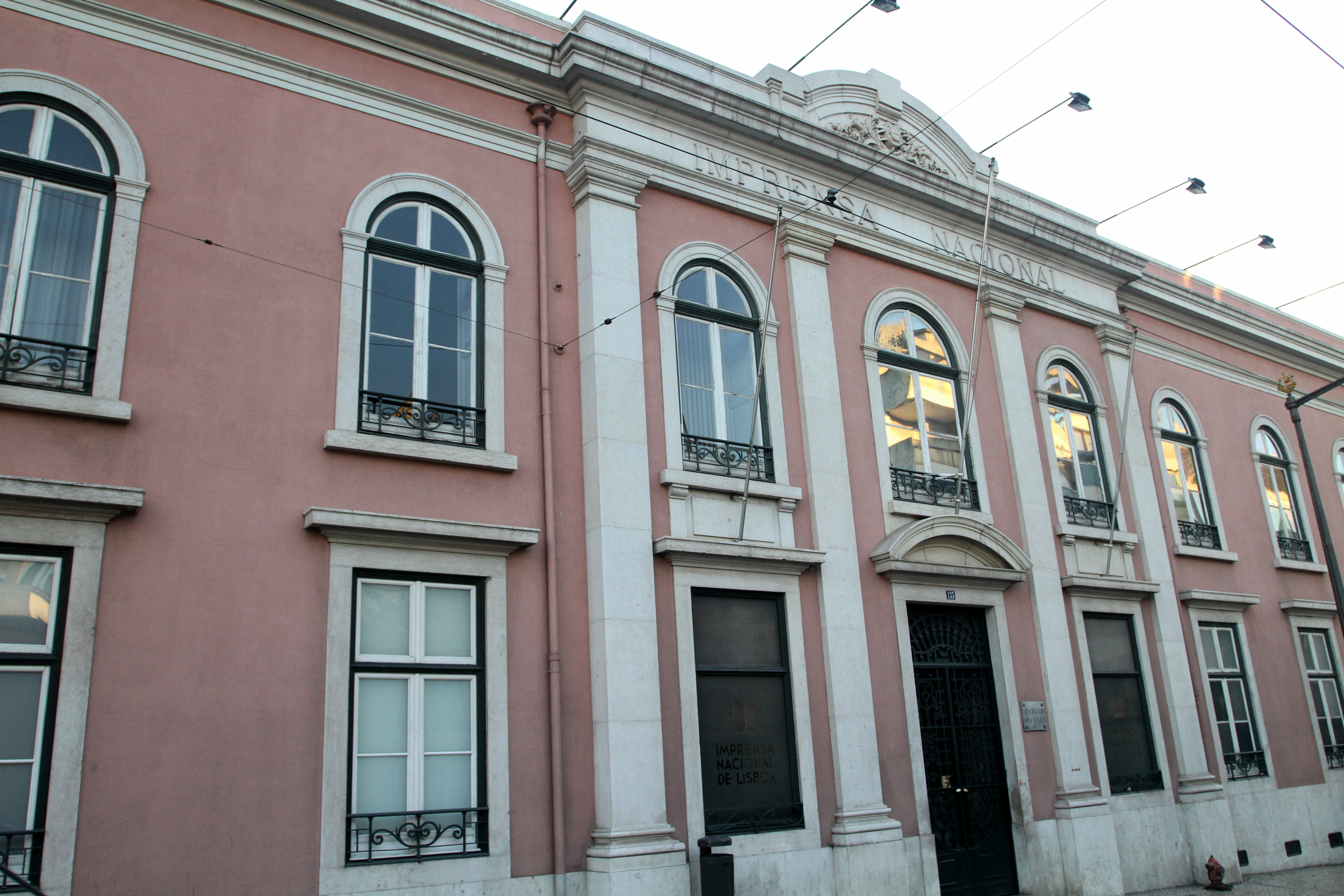 Fachada da Imprensa Nacional This file was uploaded for Wiki Loves Monuments in Portugal with the unique identifier 340628.